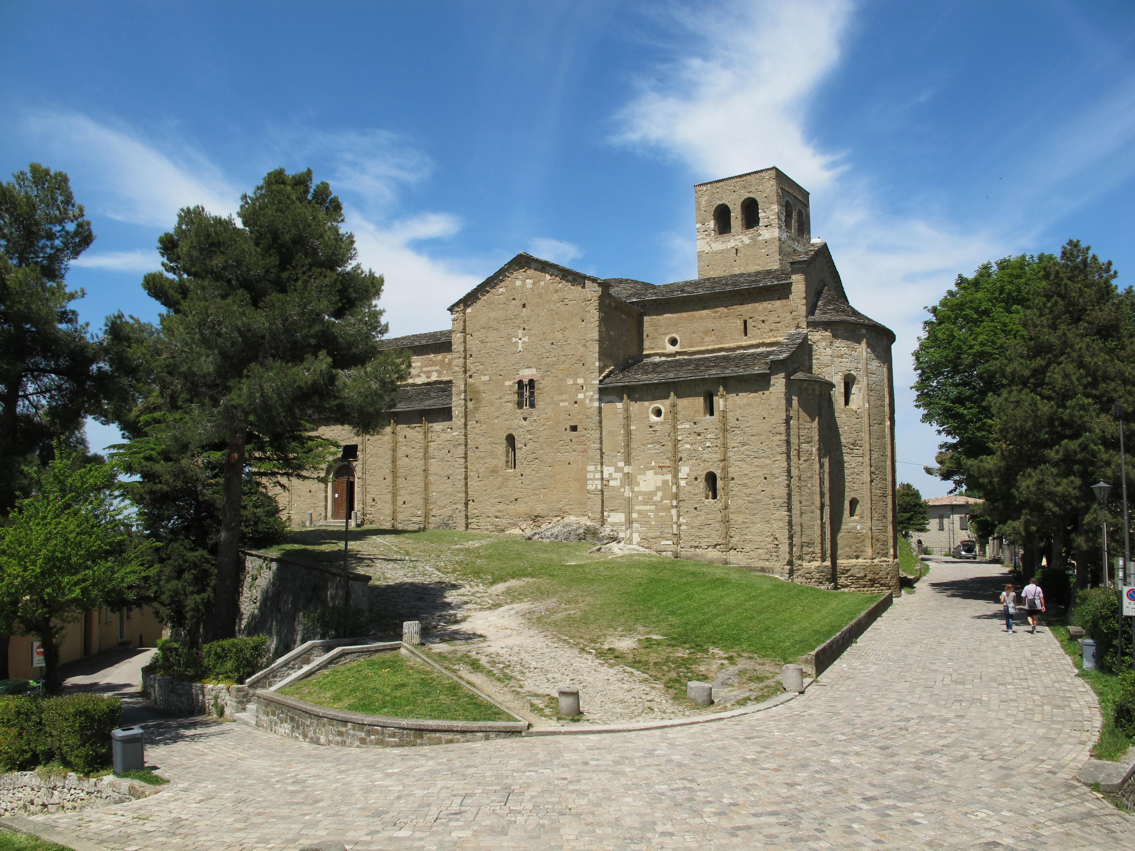 Eglise de San Léo